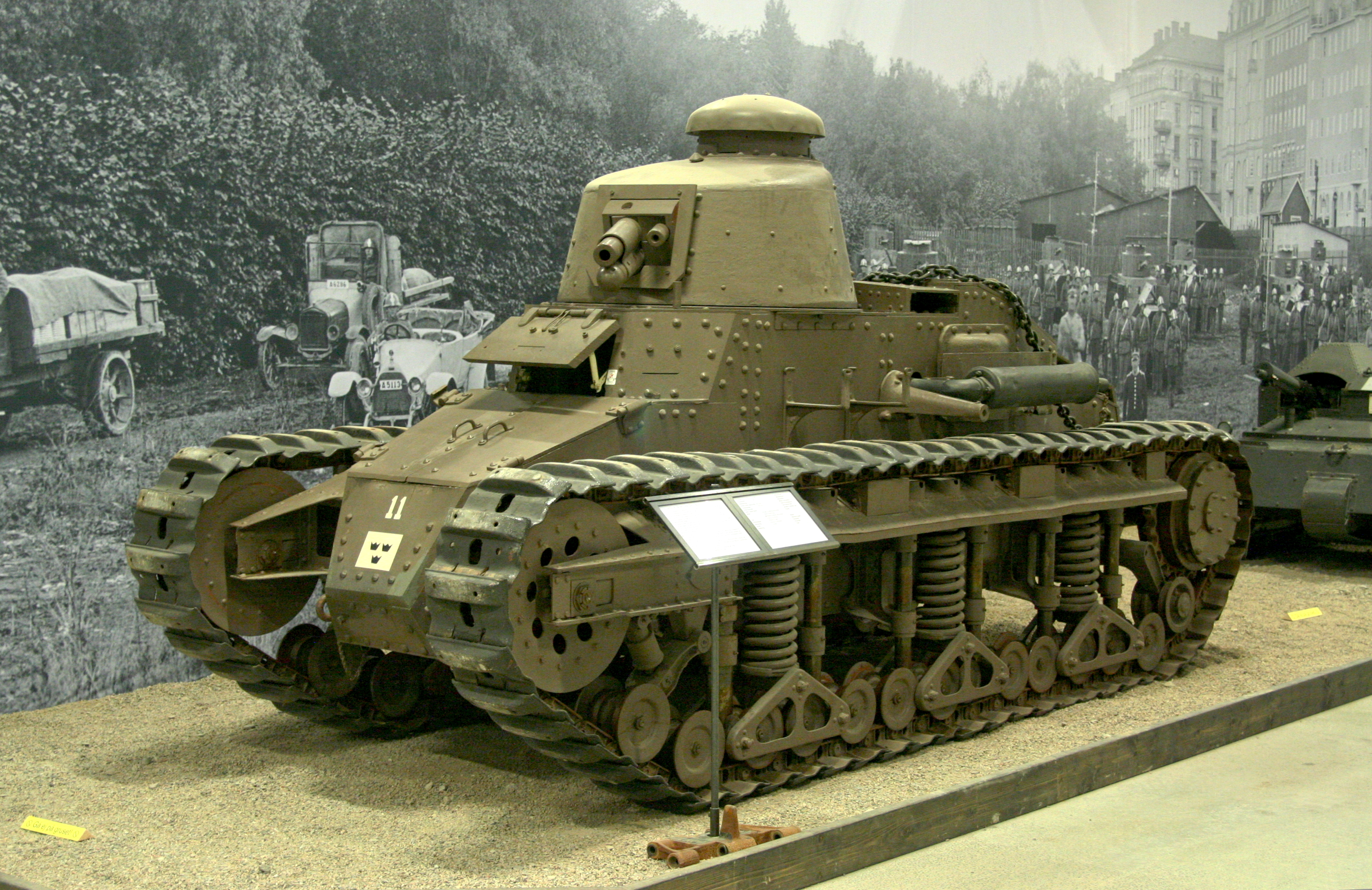 Leichter Panzer Renault NC 27 im Sveriges Försvarsfordonsmuseum - Arsenalen - in Strängnäs am 12.August 2011